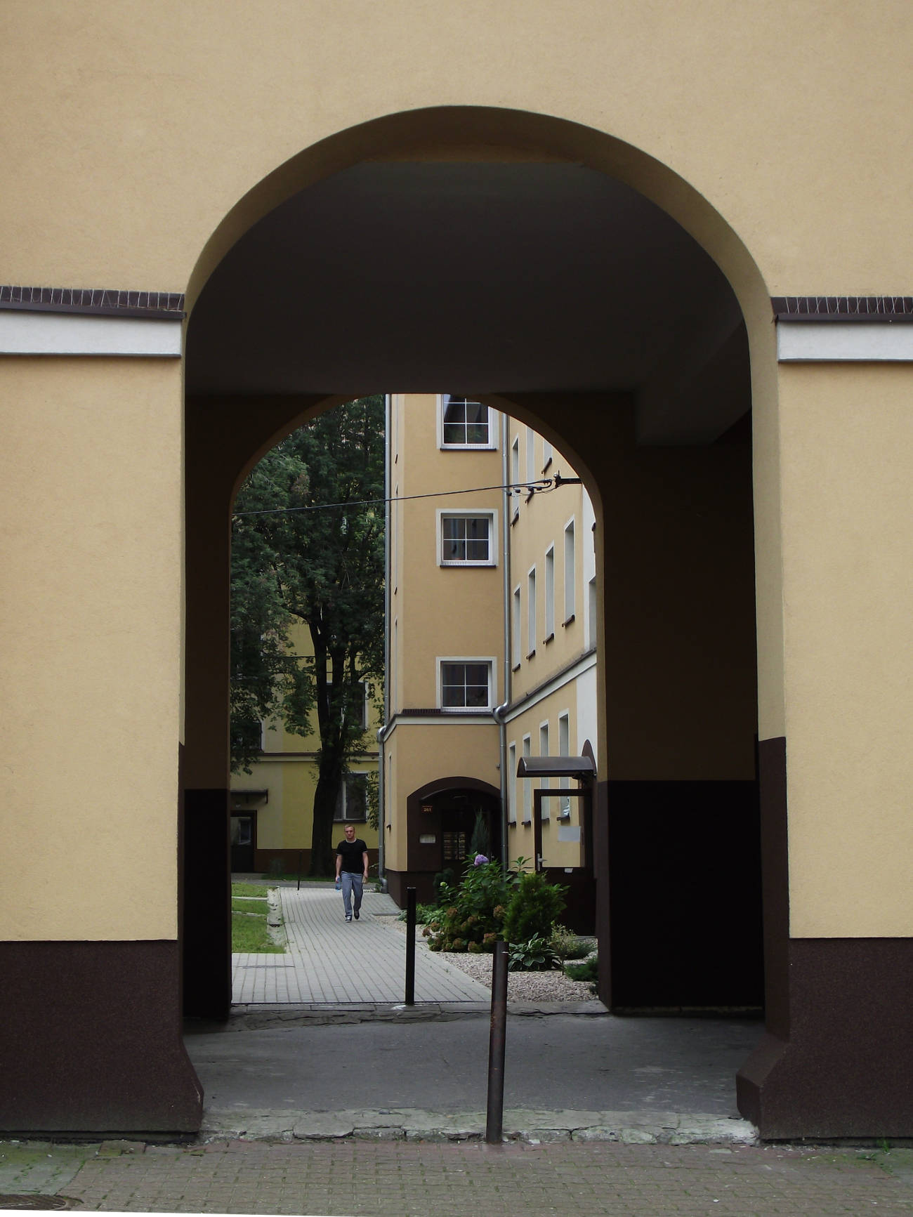 Bielsko-Biała, osiedle Grunwaldzkie - brama.